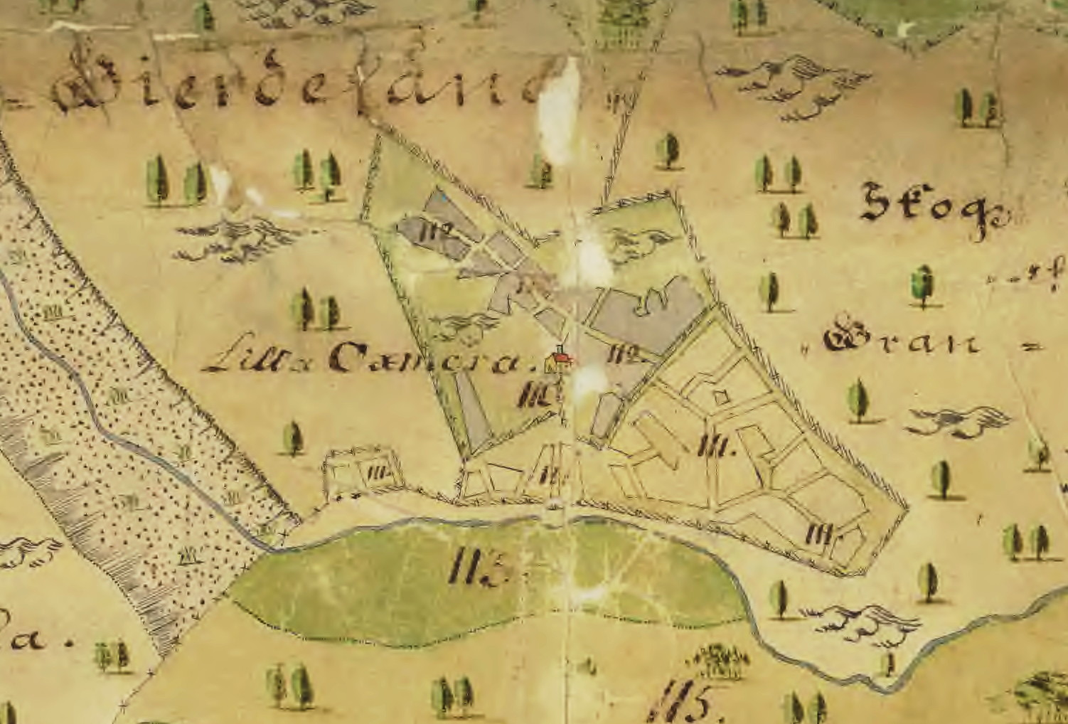 Torpet Lilla Oxmora 1722 (heter idag Högmora)